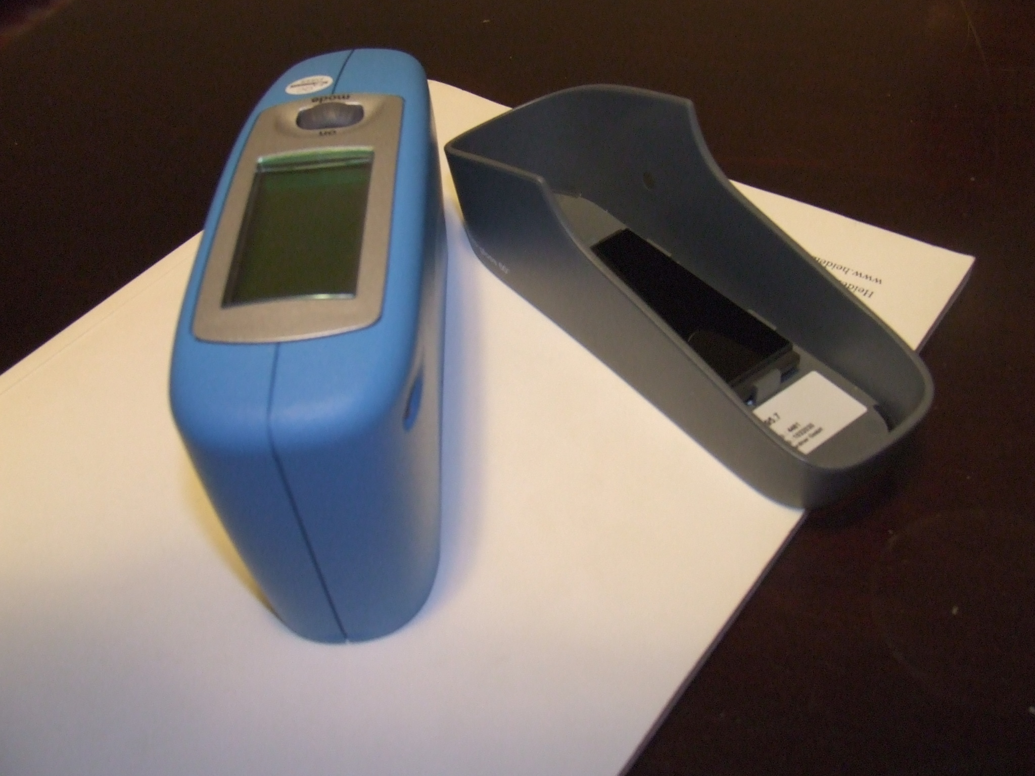 glossmeter/połyskomierz